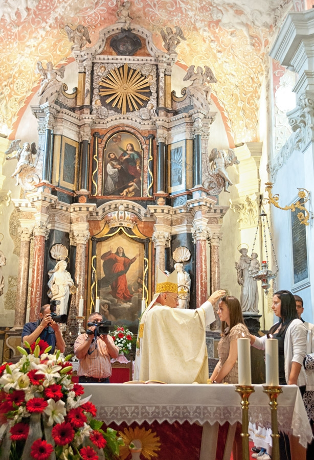 crkva Uznesenja Blažene Djevice Marije u Rijeci